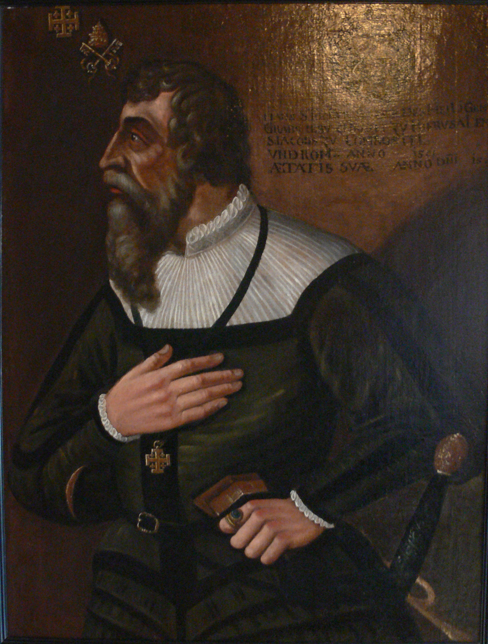 Schaffhausen, Museum zu Allerheiligen Gotisches Stübchen (genannt „Abtstübchen“) Portrait Hans Stokar (Stockar); Kaufmann, Stadtrat, Jerusalempilger (1490-1556); anonymer Meister, 16. Jh.; siehe auch File:Gotische Stube Museum SH 3.jpg und Stadtarchiv Schaffhausen